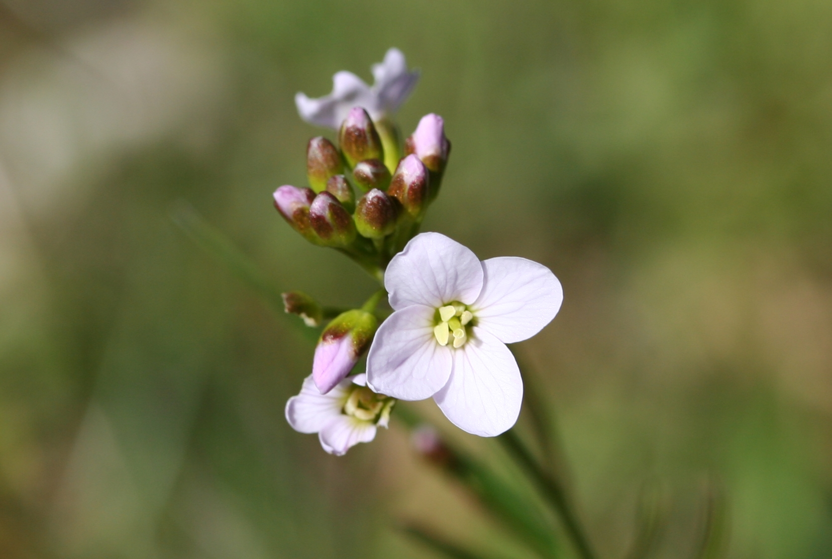 Cardamine_pratensis Thijsses Hof, Bloemendaal, the Netherlands 17 april 2006